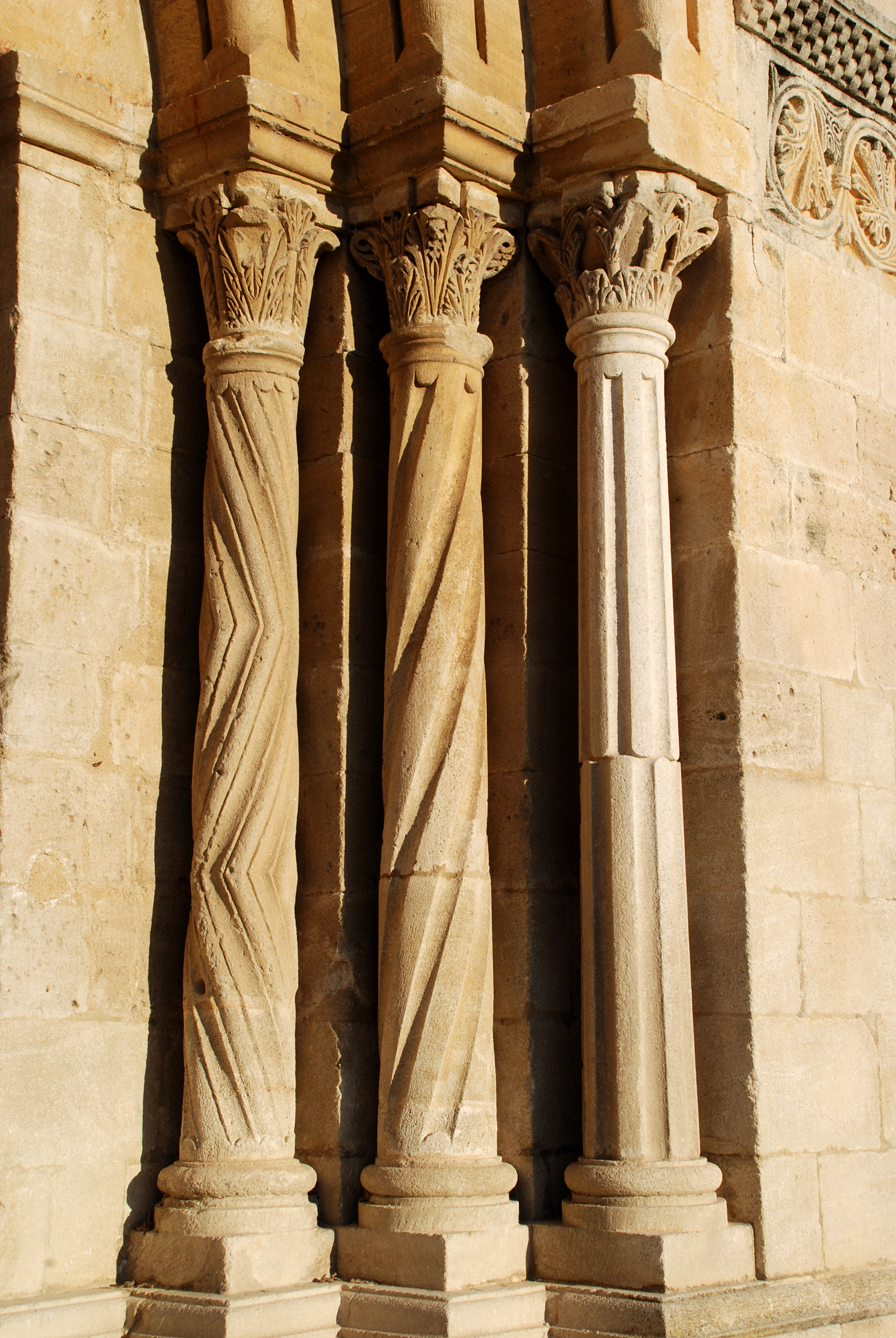 France - Provence - Prieuré Notre-Dame de Salagon